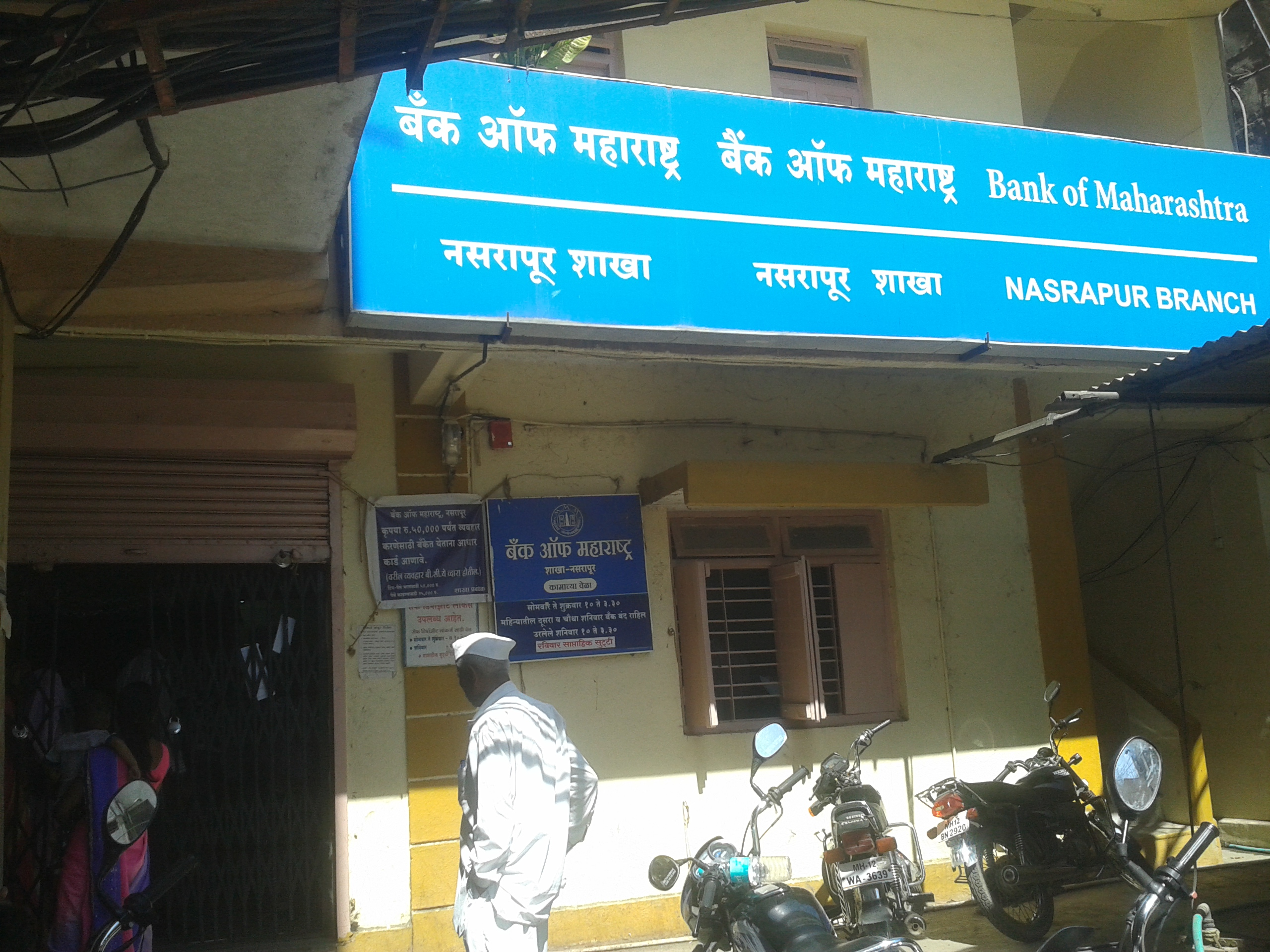 बँक ऑफ महाराष्ट्र नसरापूर